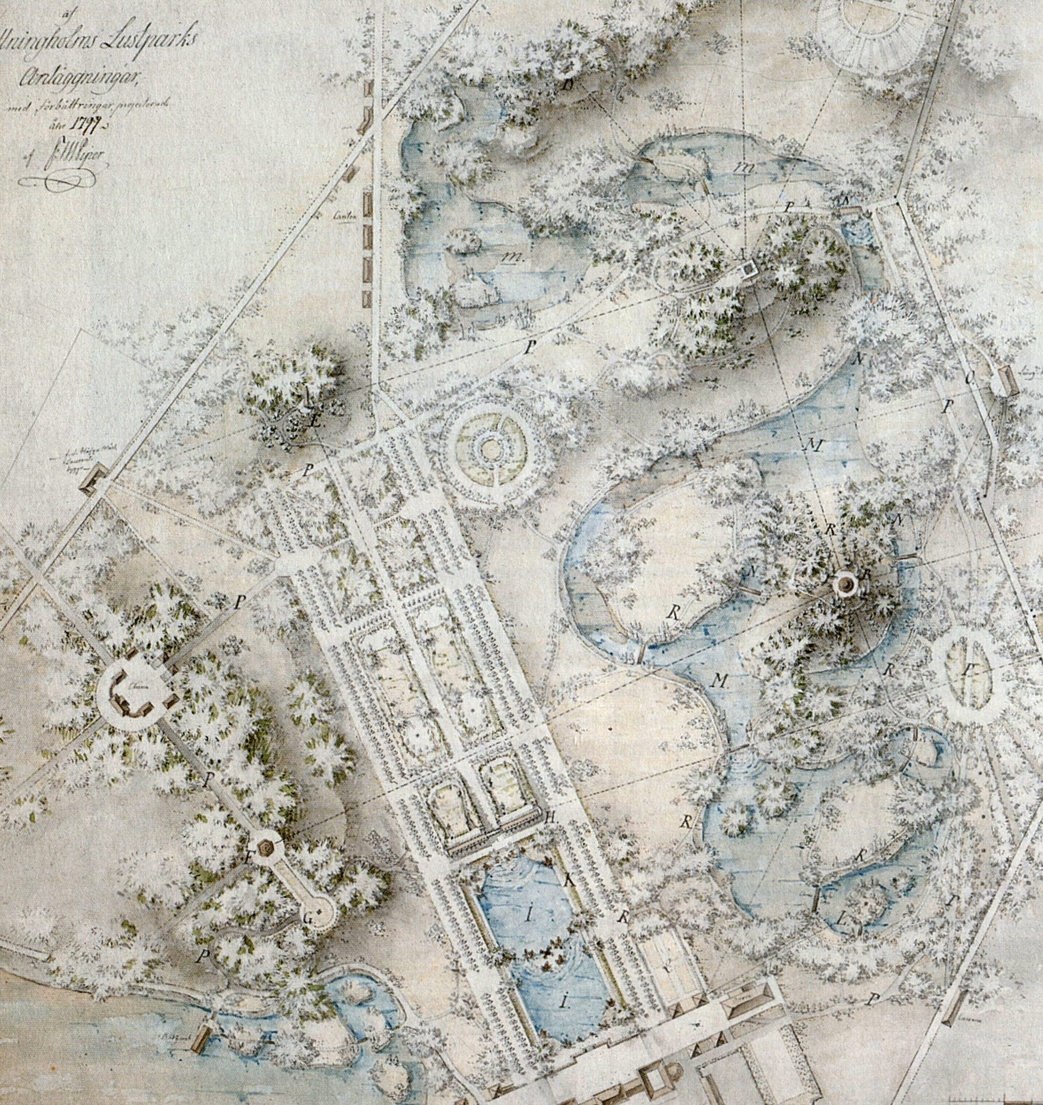 Förslag till ny park vid Drottningholms slott, norr är till höger